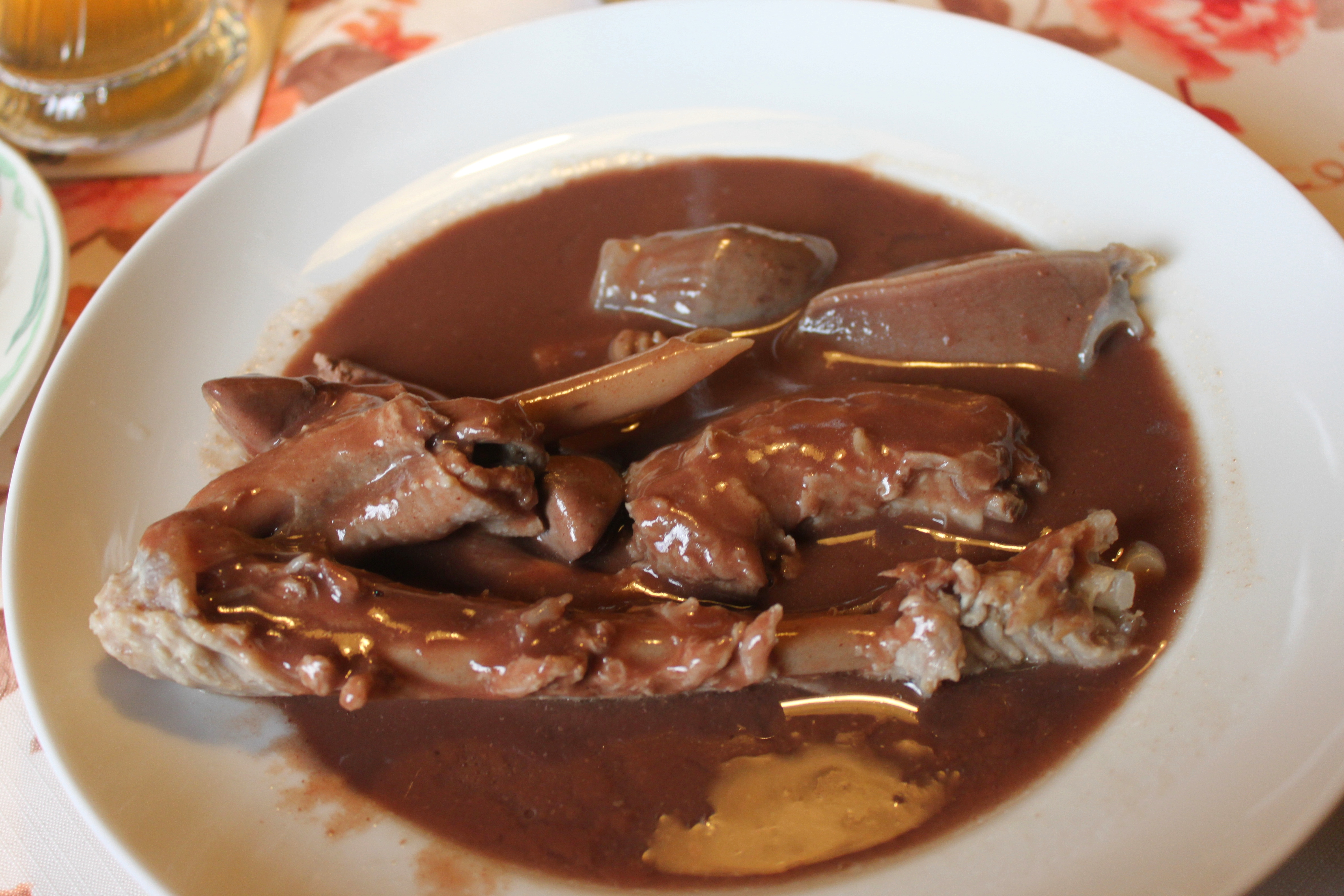 Gansjung mit Blutsoße im Gasthof Zur Linde in Willmersreuth einem Ortsteil von Mainleus